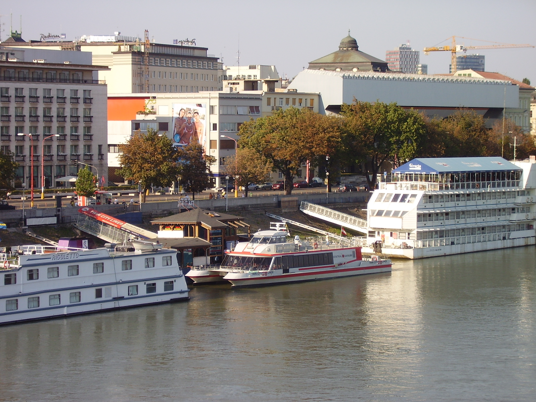 Bratislava